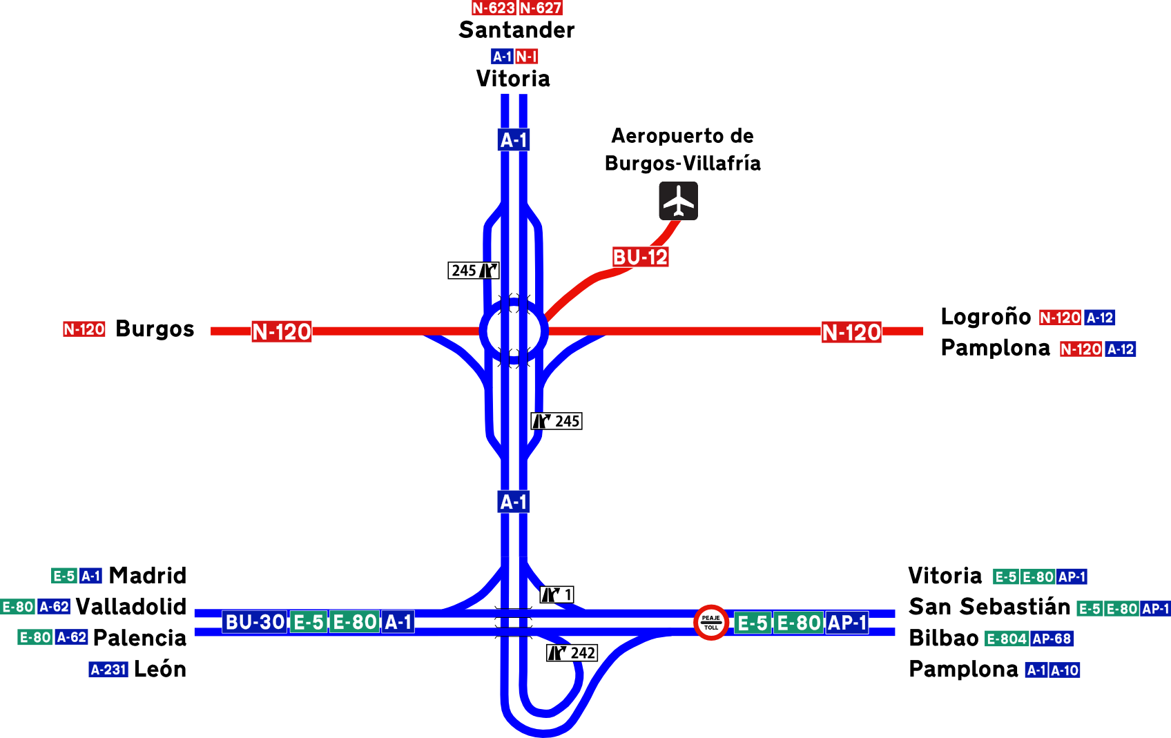 Plano esquemático de los accesos al Aeropuerto de Burgos